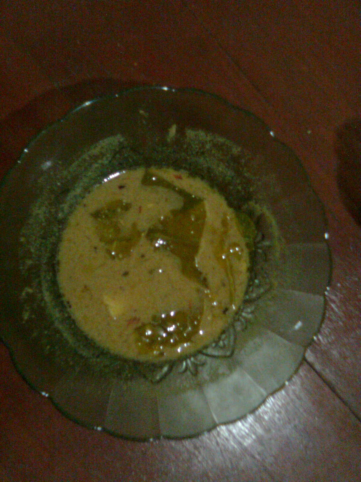 kuliner Indonesia